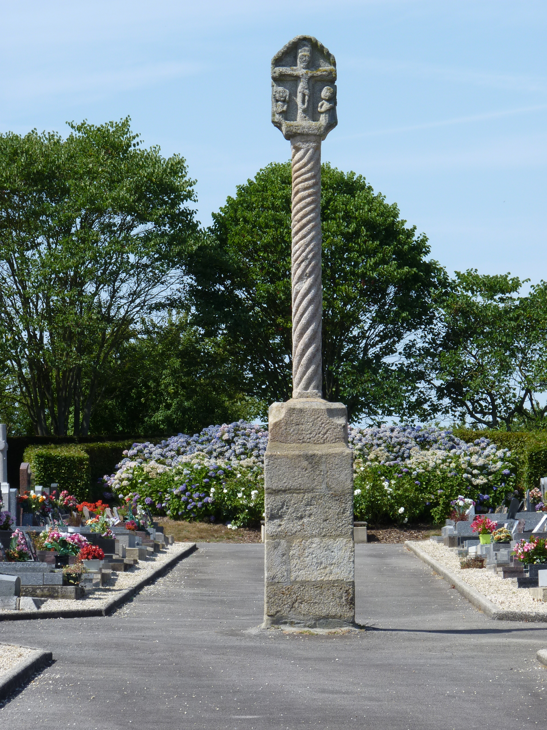 Croix plus primitive que celle du fond du cimetière